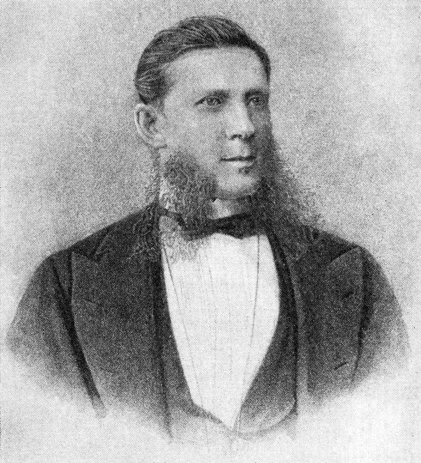 Пётр Петрович Пекарский — исследователь русской литературы и истории, библиограф, академик Петербургской академии наук.